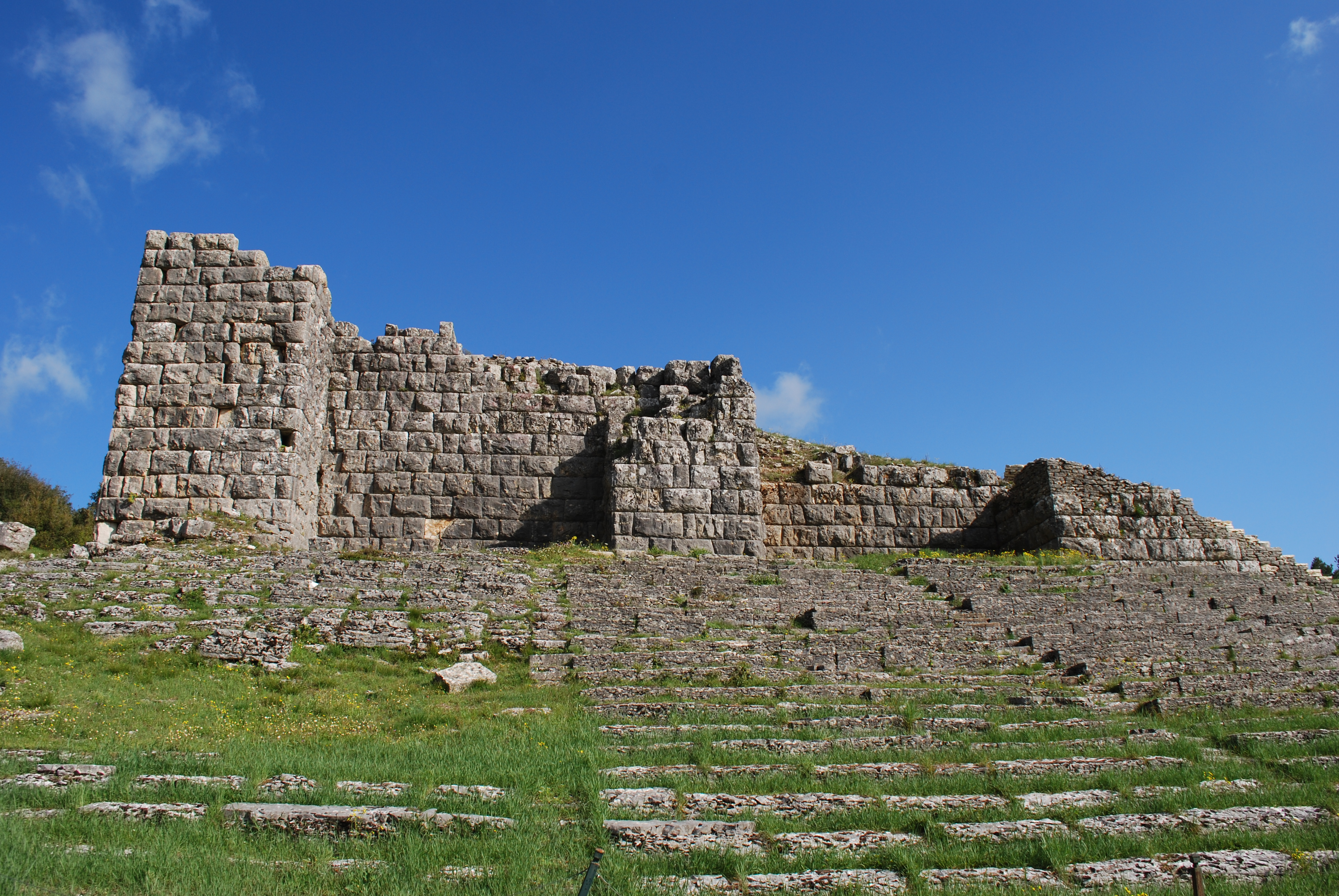 Vue du site archéologique de Dodone, en Epire.